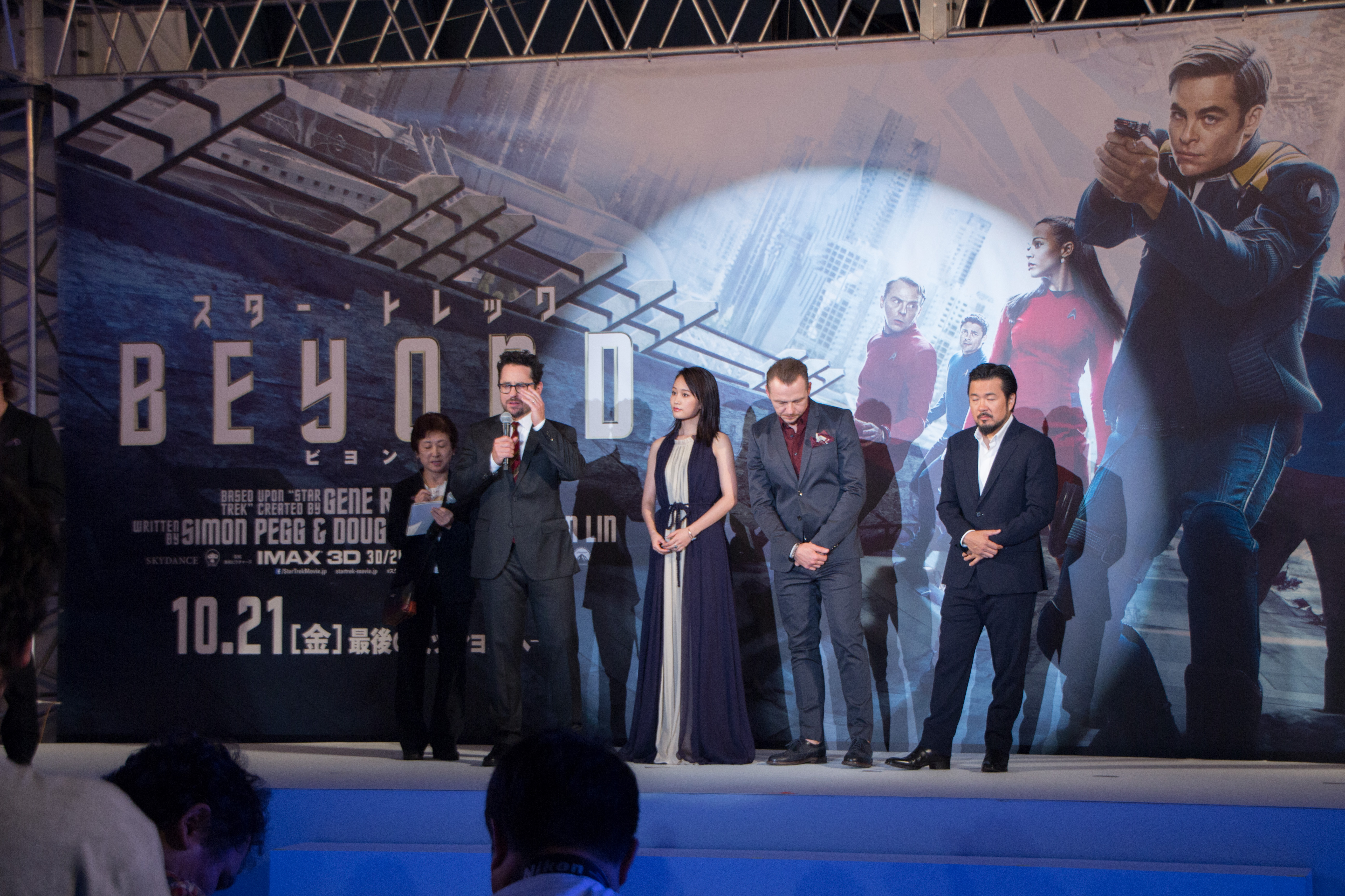 スター・トレック BEYOND ジャパン・プレミア レッドカーペット J・J・エイブラムス サイモン・ペッグ ジャスティン・リン 前田敦子